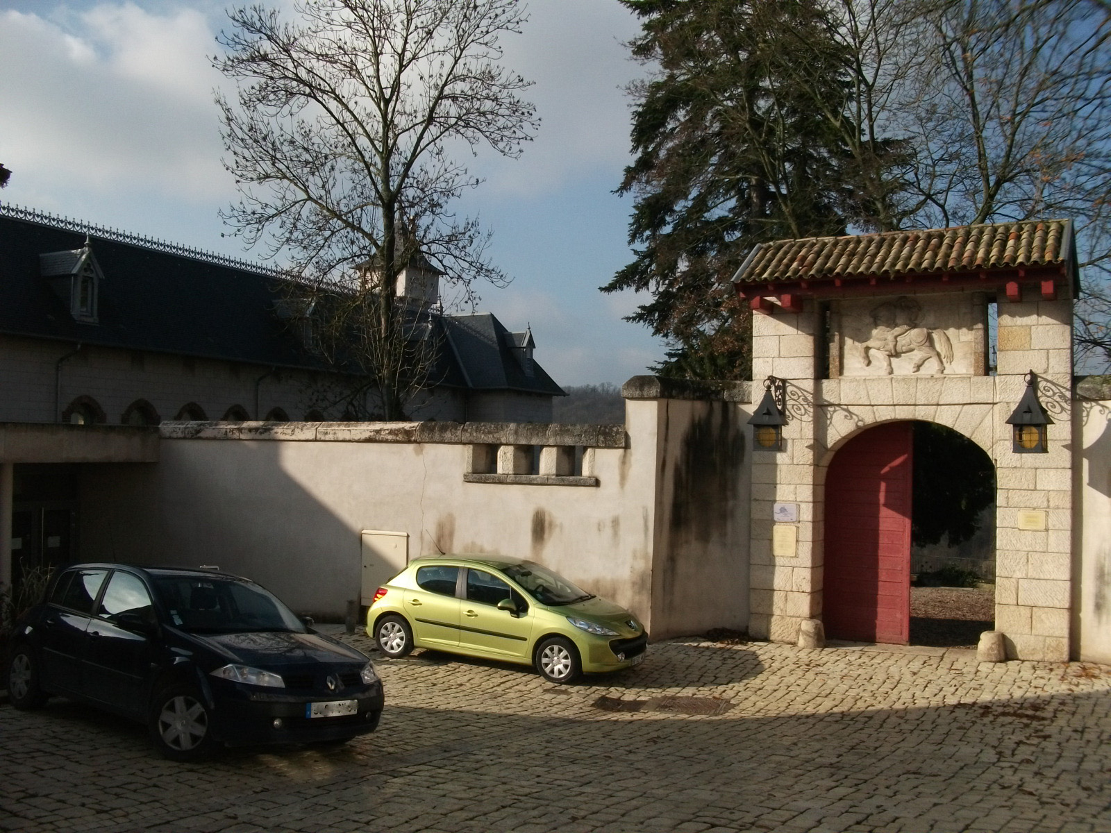 Liverdun, porte d'entrée du_Château Corbin et du parc attenant, aujourd'hui médiatèque.